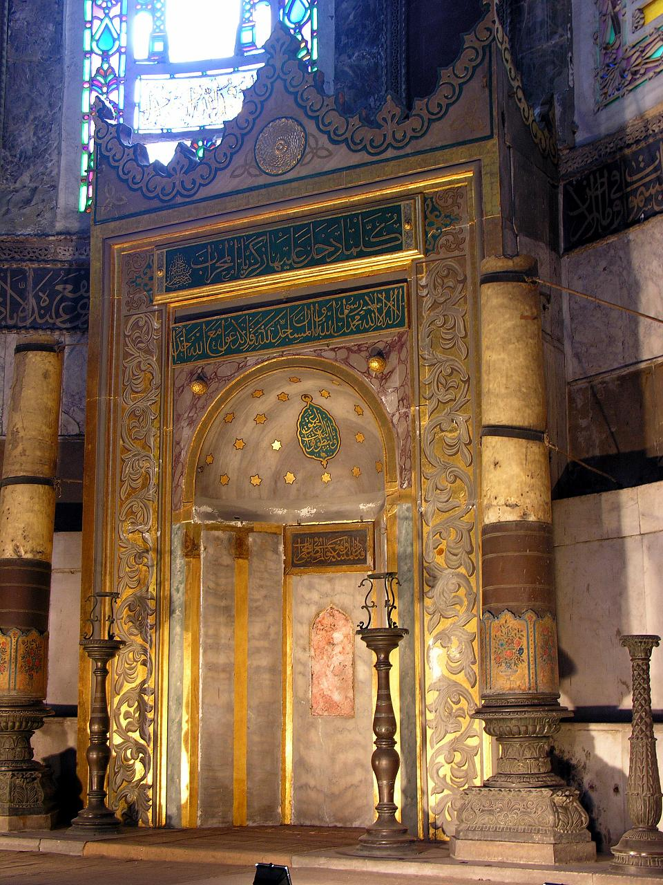 Turkey-3052